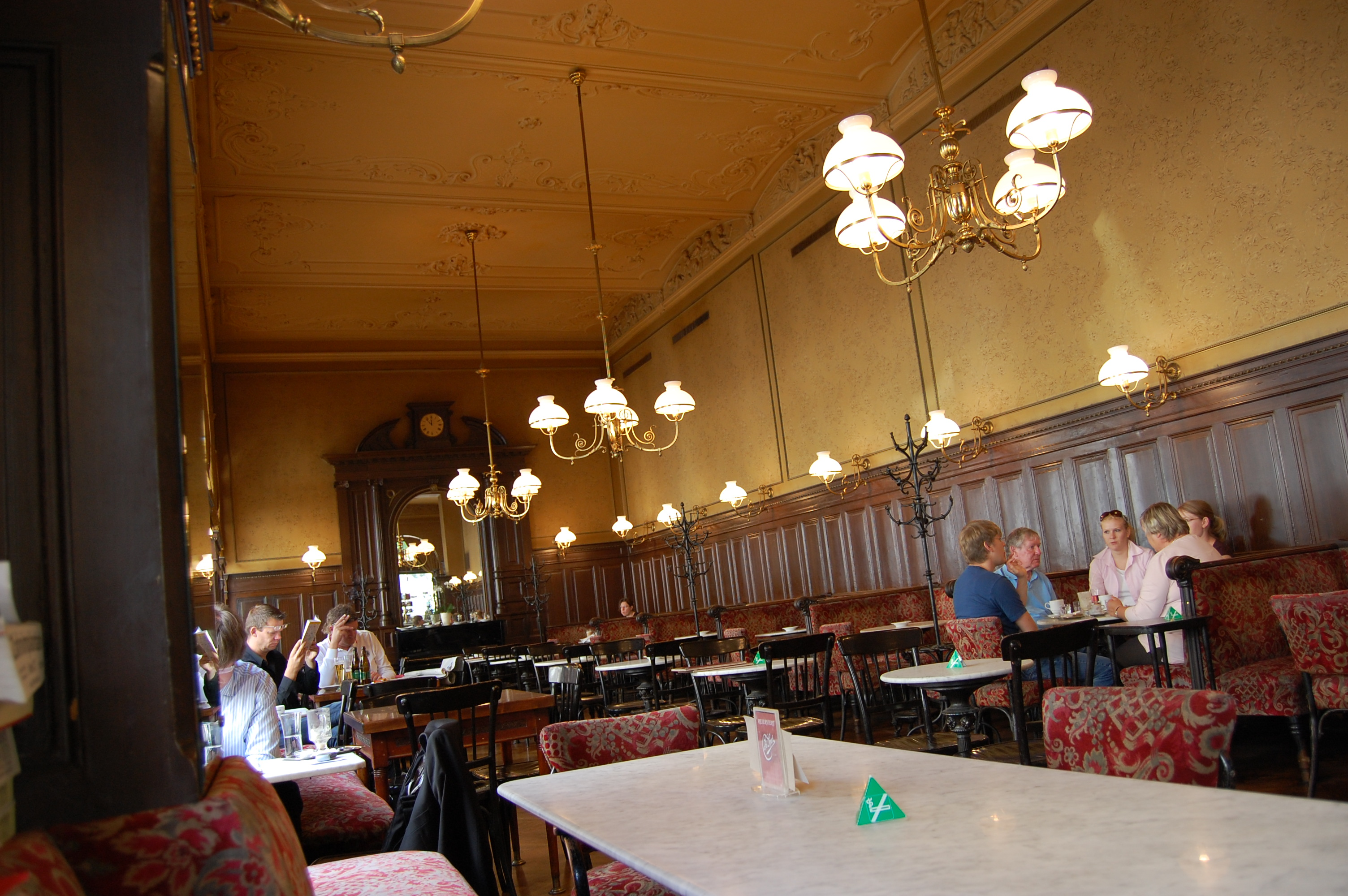 Wien, Café Sperl